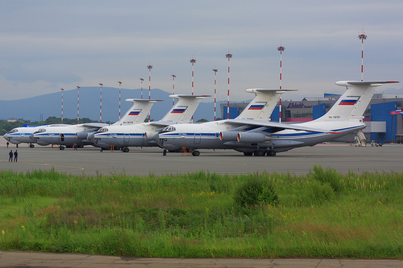 VVO_2938